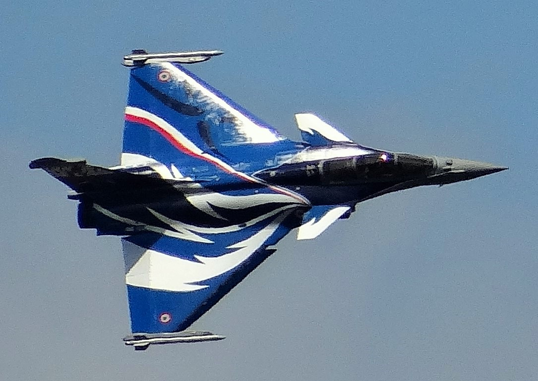 Démonstration de l'avion Rafale (Dassault Aviation) au Salon de Paris Le Bourget 2017